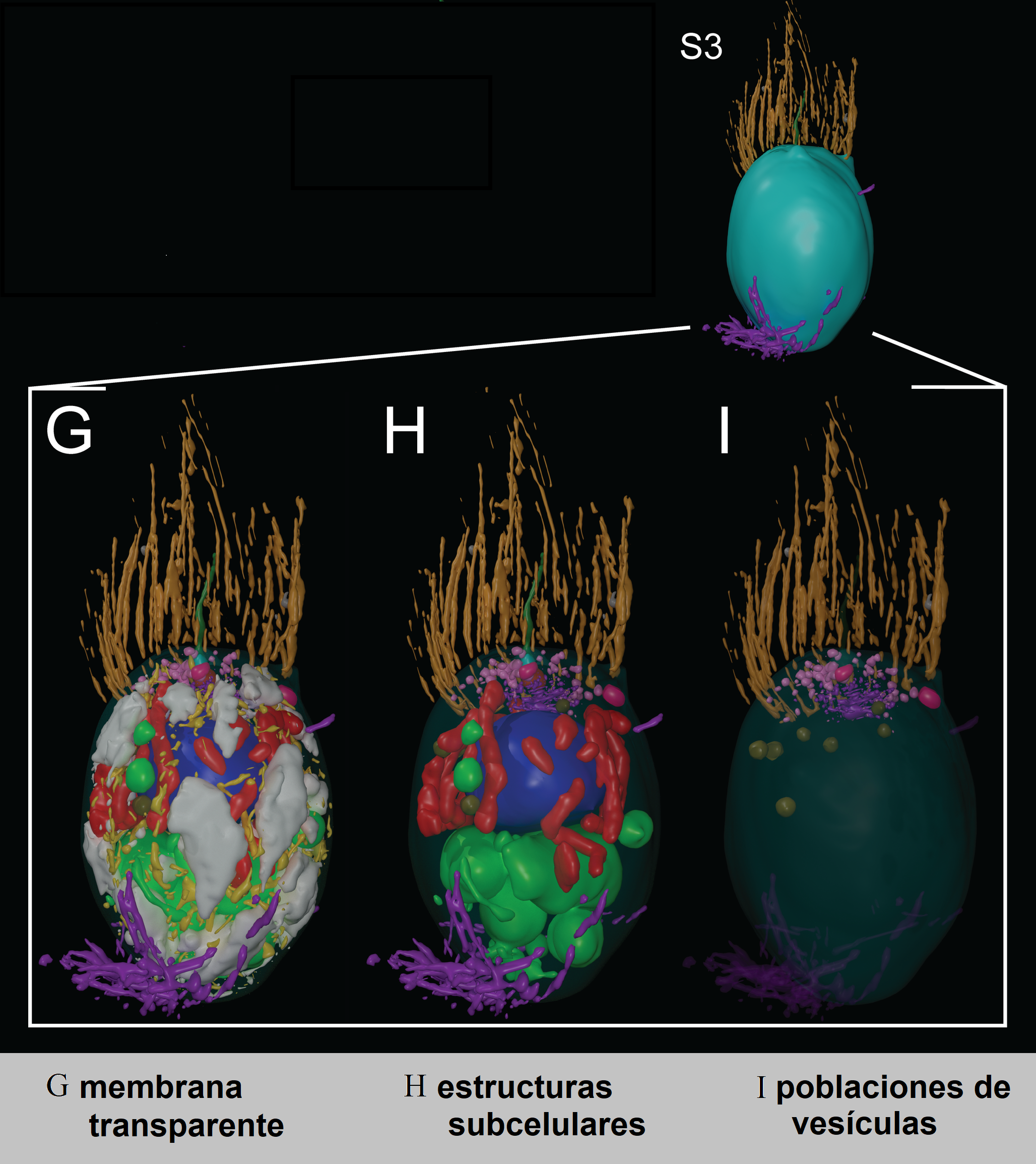 Fig. 1. Arquitectura celular 3D de coanoflagelados. Reconstrucción 3D por microscopía electrónica de transmisión ultrafina en serie, de células S. roseta. (G) La membrana plasmática se hizo transparente para observar la estructura. (H) el glucógeno y ER se eliminaron para permitir una mejor visualización de las estructuras subcelulares y (I) las poblaciones de vesículas. Se muestran vesículas apicales (rosa), vacuolas alimenticias (verde), vacuolas endocitóticas (fucsia), RE (amarillo), vesículas extracelulares (gris), filopodios (externo, púrpura), cuerpo basal flagelar (azul claro), flagelo (verde oscuro), almacenamiento de glucógeno (blanco), aparato de Golgi y vesículas (púrpura), Vesículas grandes (marrón), collar microvilar (naranja claro), mitocondria (rojo), cuerpo basal no flagelar (naranja oscuro), y núcleos (azul oscuro). Barra de escala = aproximadamente 1 μm.